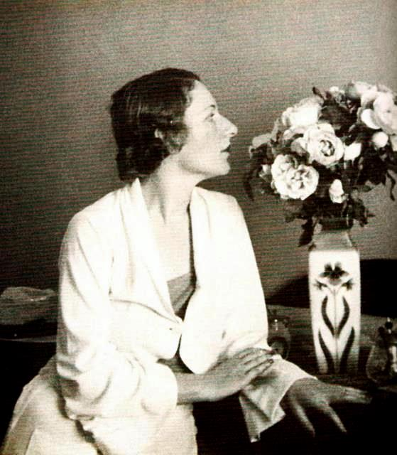 Retrato de Eva Klabin na casa de seus pais, 1929.